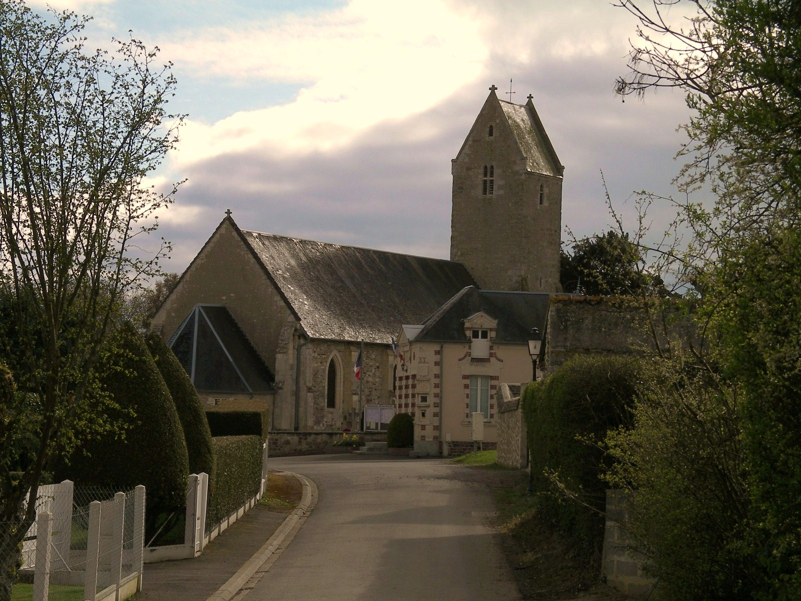 Eglise et mairie de Vacognes, commune de Vacognes-Neuilly (Calvados)